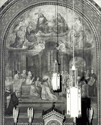 Gemälde von Johann Schmitt St. Francis Seminary Milwaukee. Zweite Person von rechts Bischof Friedrich Xaver Katzer